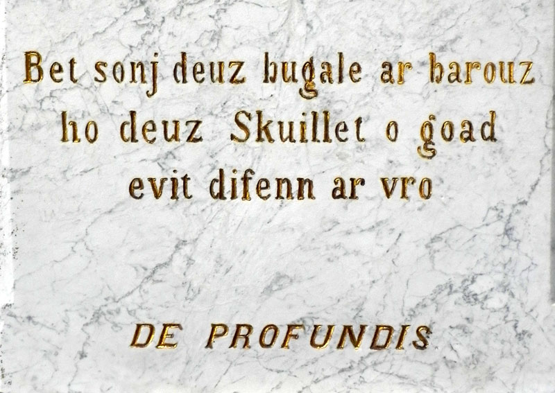 Lomikael-an-Traezh. Monumant ar re varv. Plakenn e brezhoneg